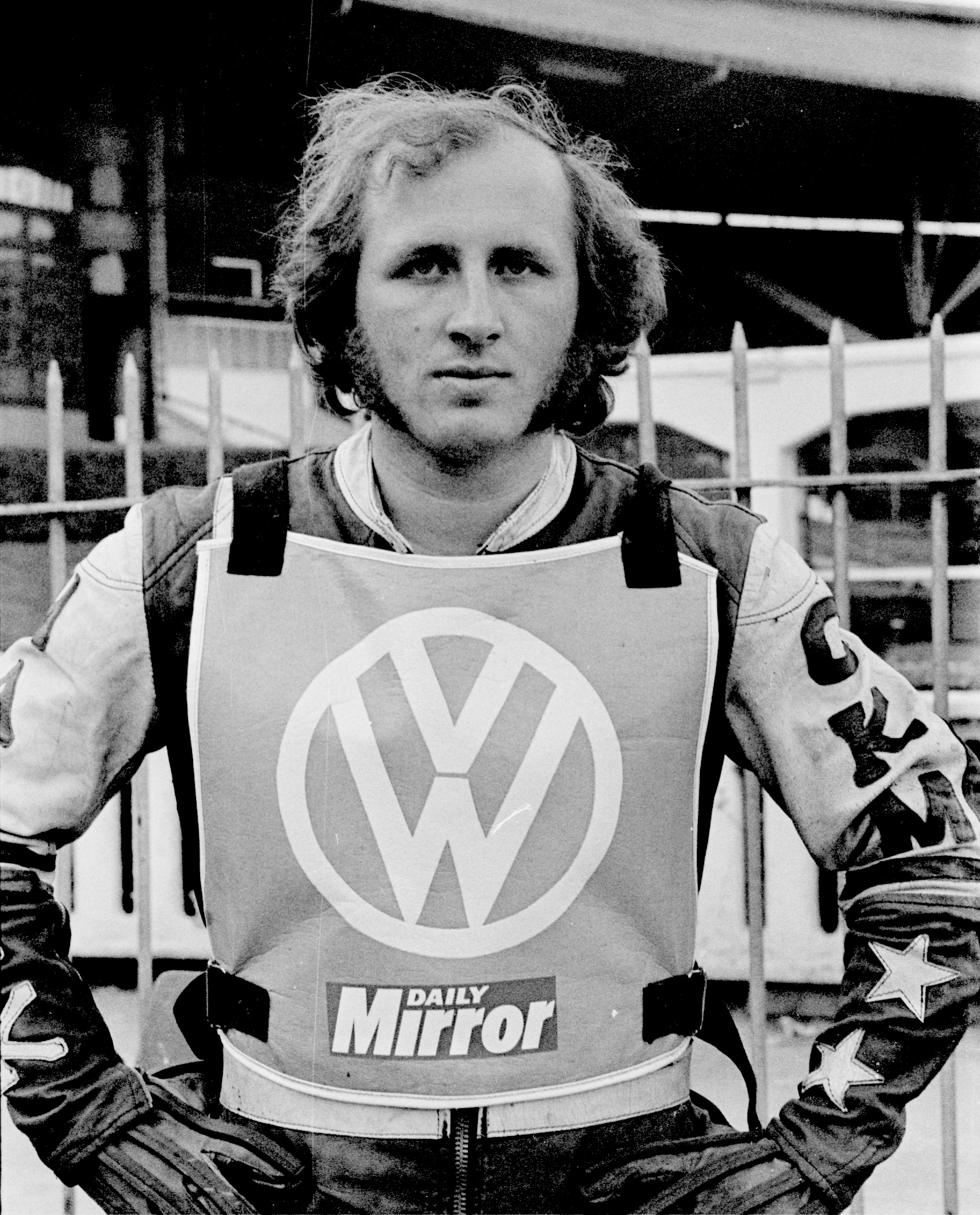 Speedway rider in the 1970s